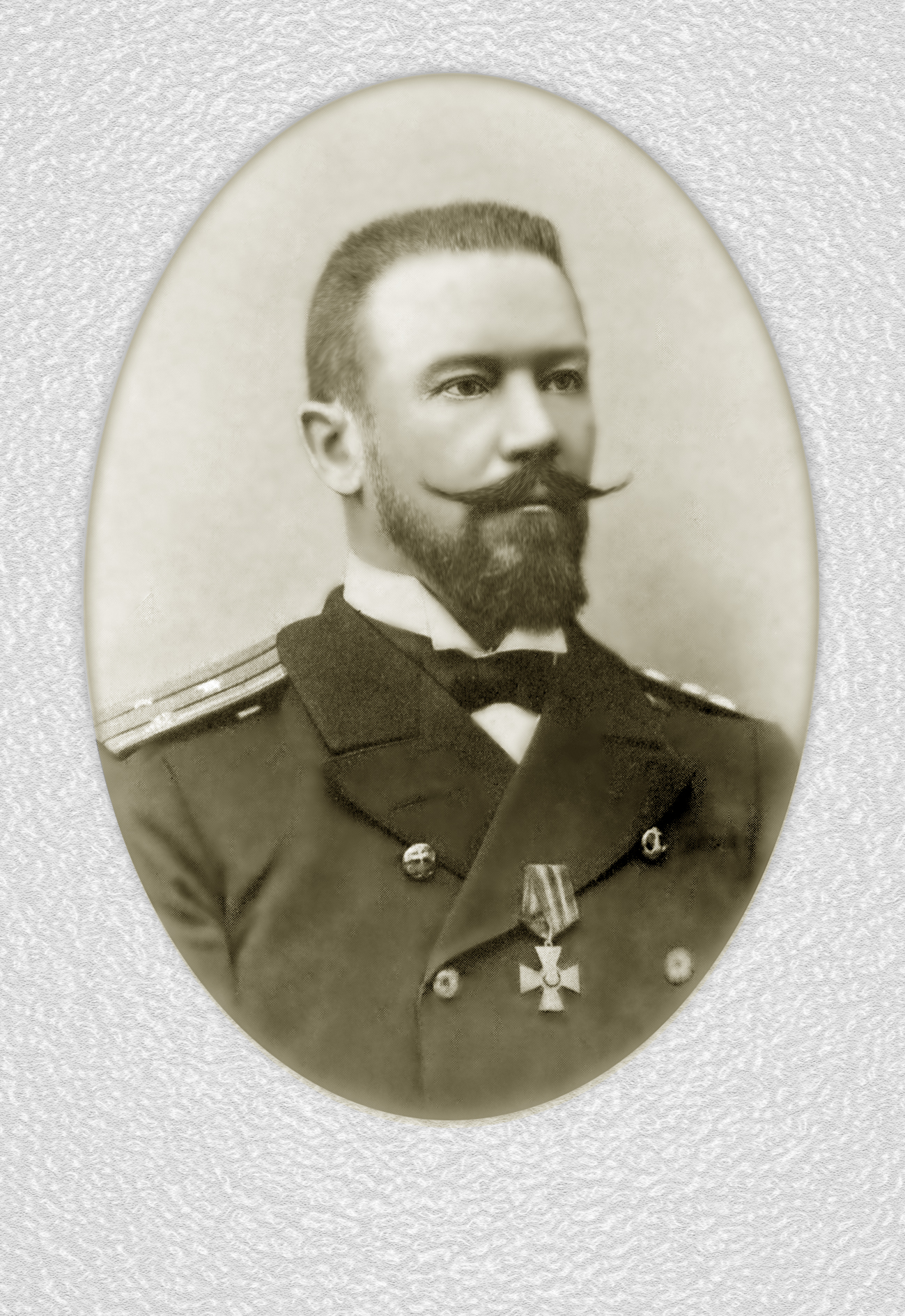 Капитанъ 2-го ранга Максимилианъ Федоровичъ фонъ Шульцъ